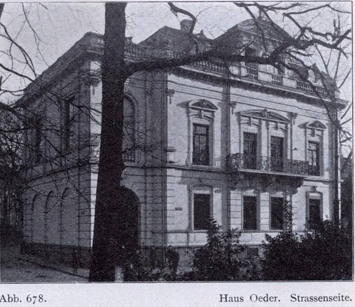 Haus Oeder Jacobistraße, Düsseldorf erbaut 1873 v. Baumeister Lorenz Schillmann,1894 umgebaut v. Jacobs & Wehling Straßenseite.jpg